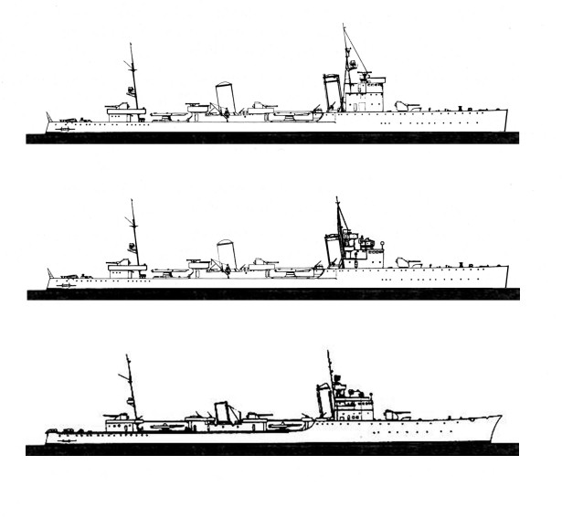 Profili dei cacciatorpediniere Classe Navigatori (dall'alto in basso): all'origine (1927-1929), dopo il primo ciclo di modifiche (1929-1930) e dopo il secondo ciclo di modifiche (1939-1940).